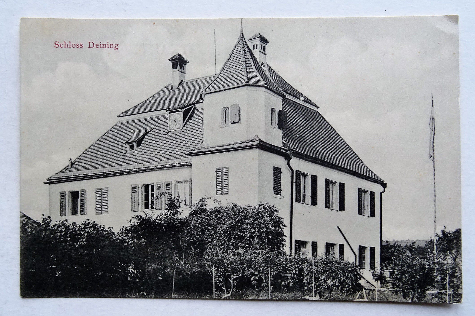 Ansichtskarte "Schloss Deining"